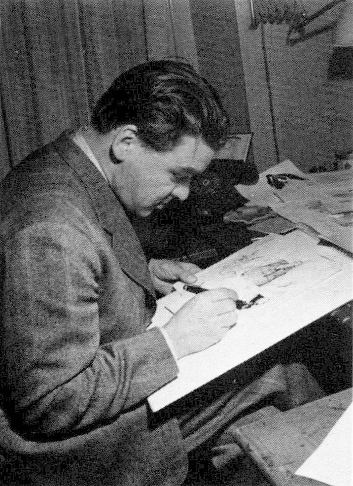 Tecknaren Birger Lundquist, foto från SBL